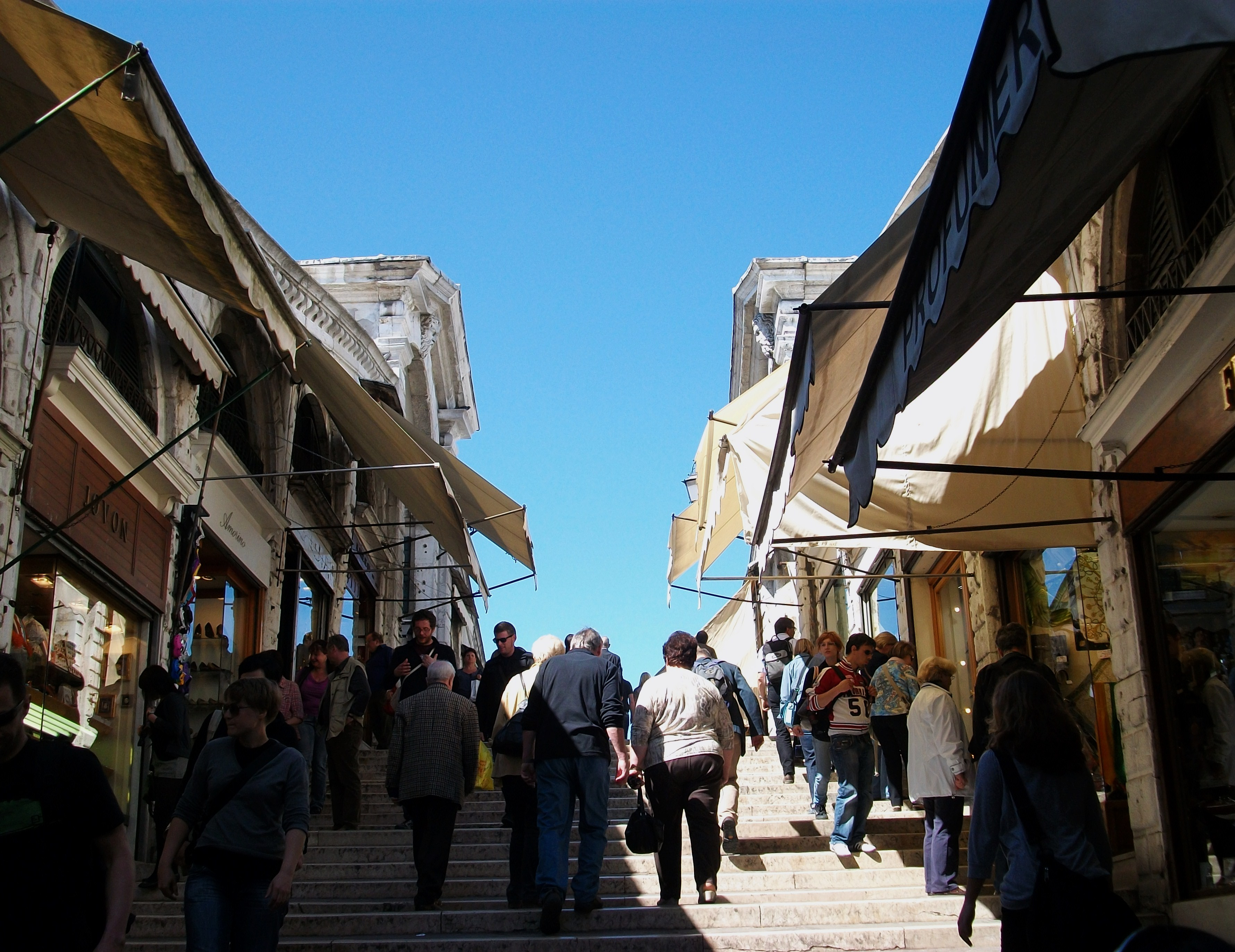 Escales del pont de Rialto, Venècia.